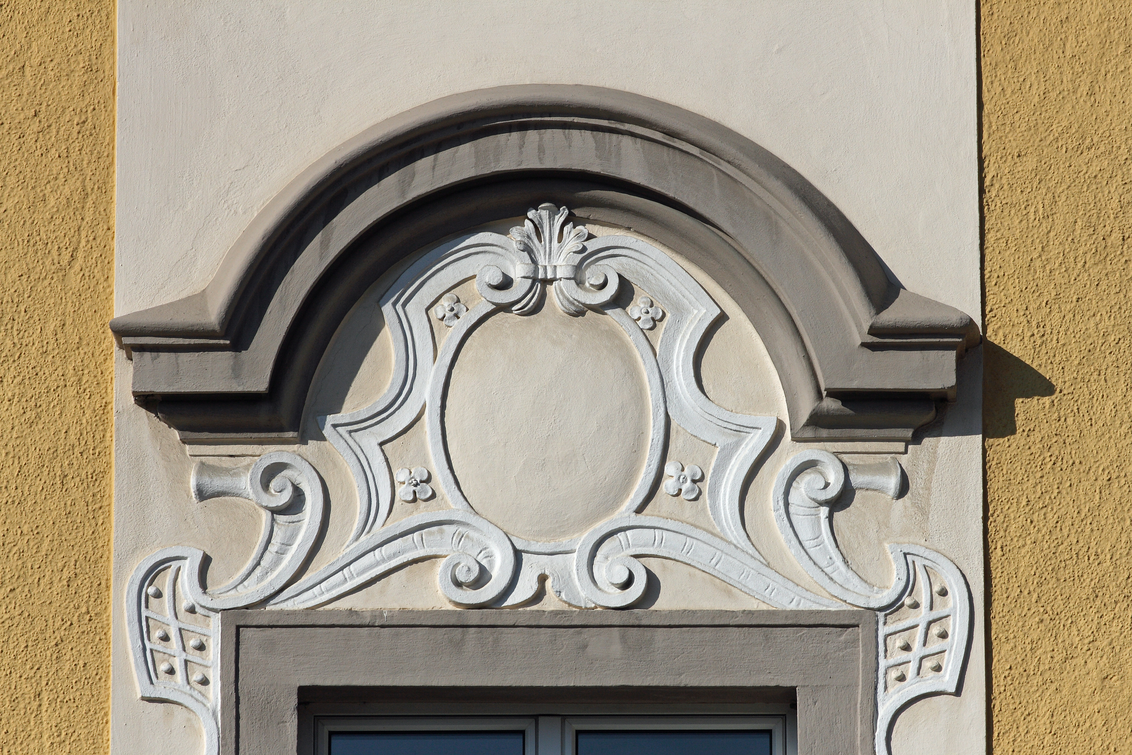 Eine barocke Verdachung über einem Fenster des Mollner Pfarrhofes (Schauseite zur Marktstraße)